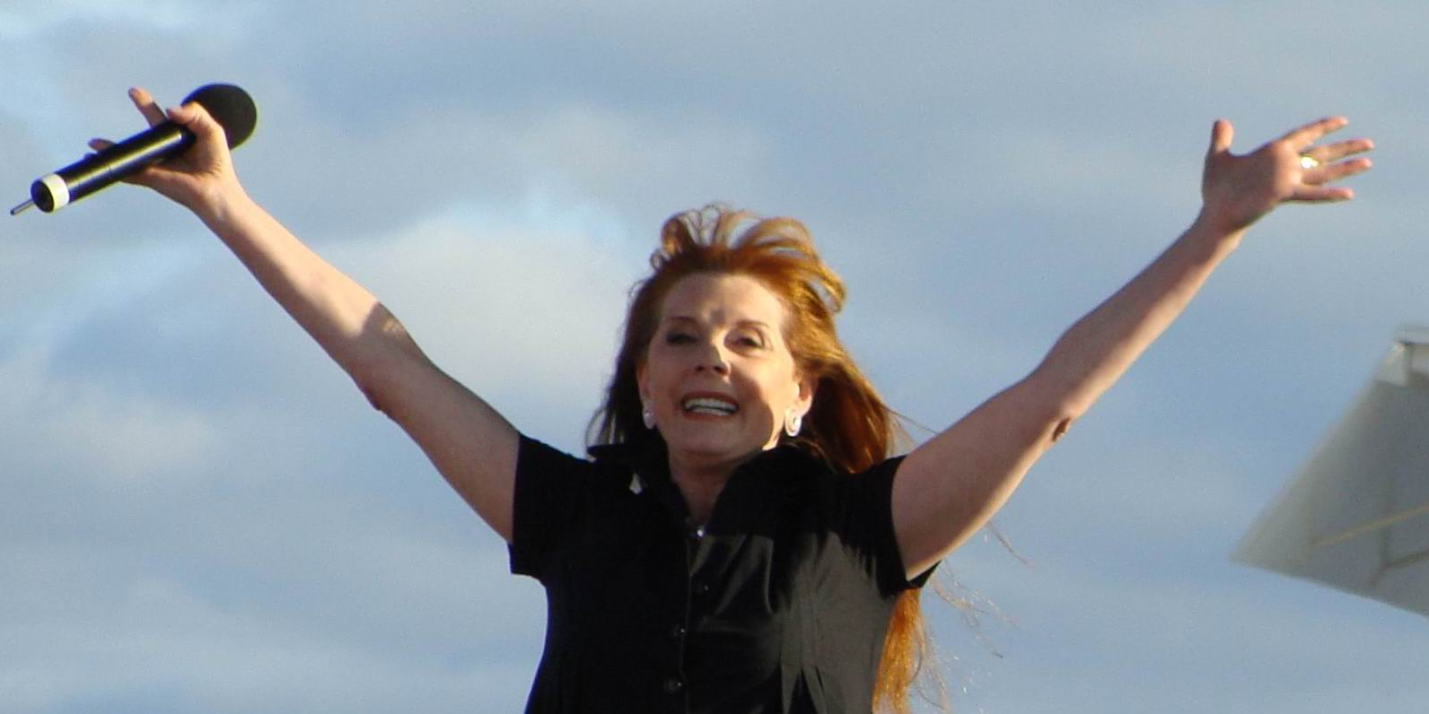 День города